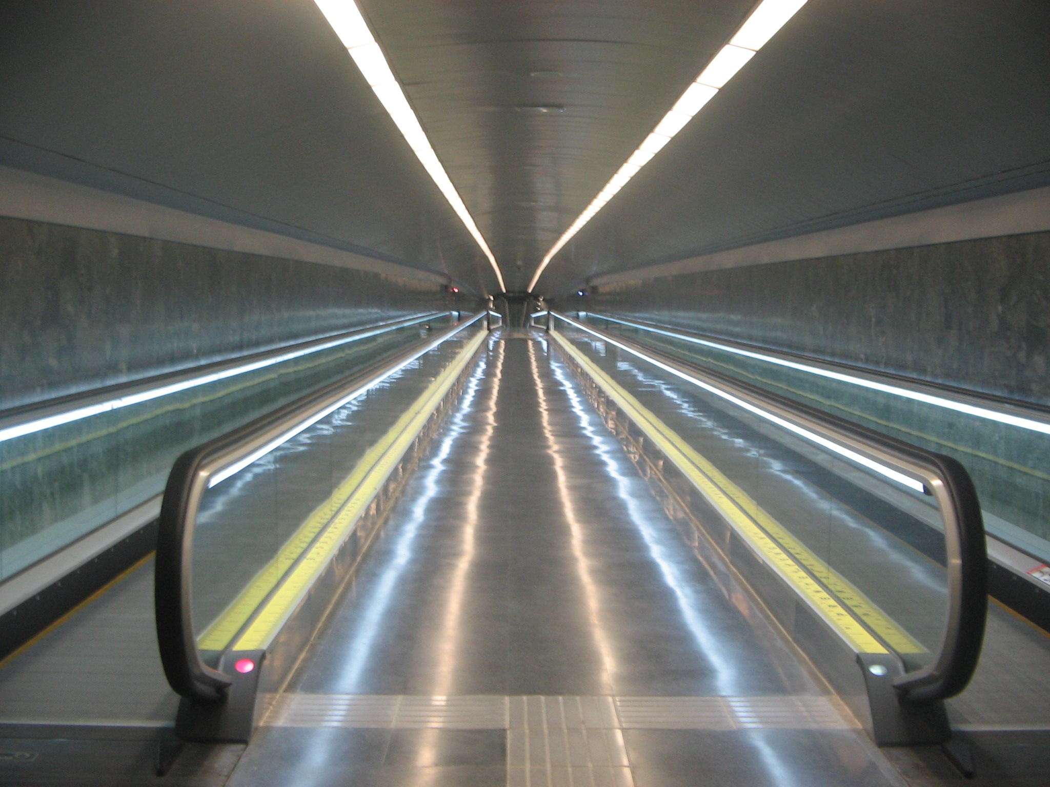 La Teixonera.